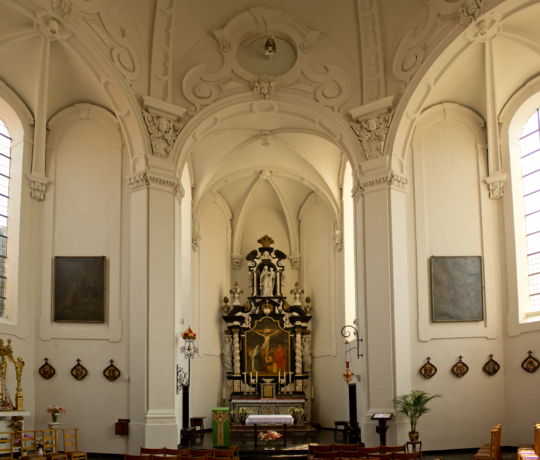 Karmelietessenklooster Onze-Lieve-Vrouw ten Troost, Vilvoorde.